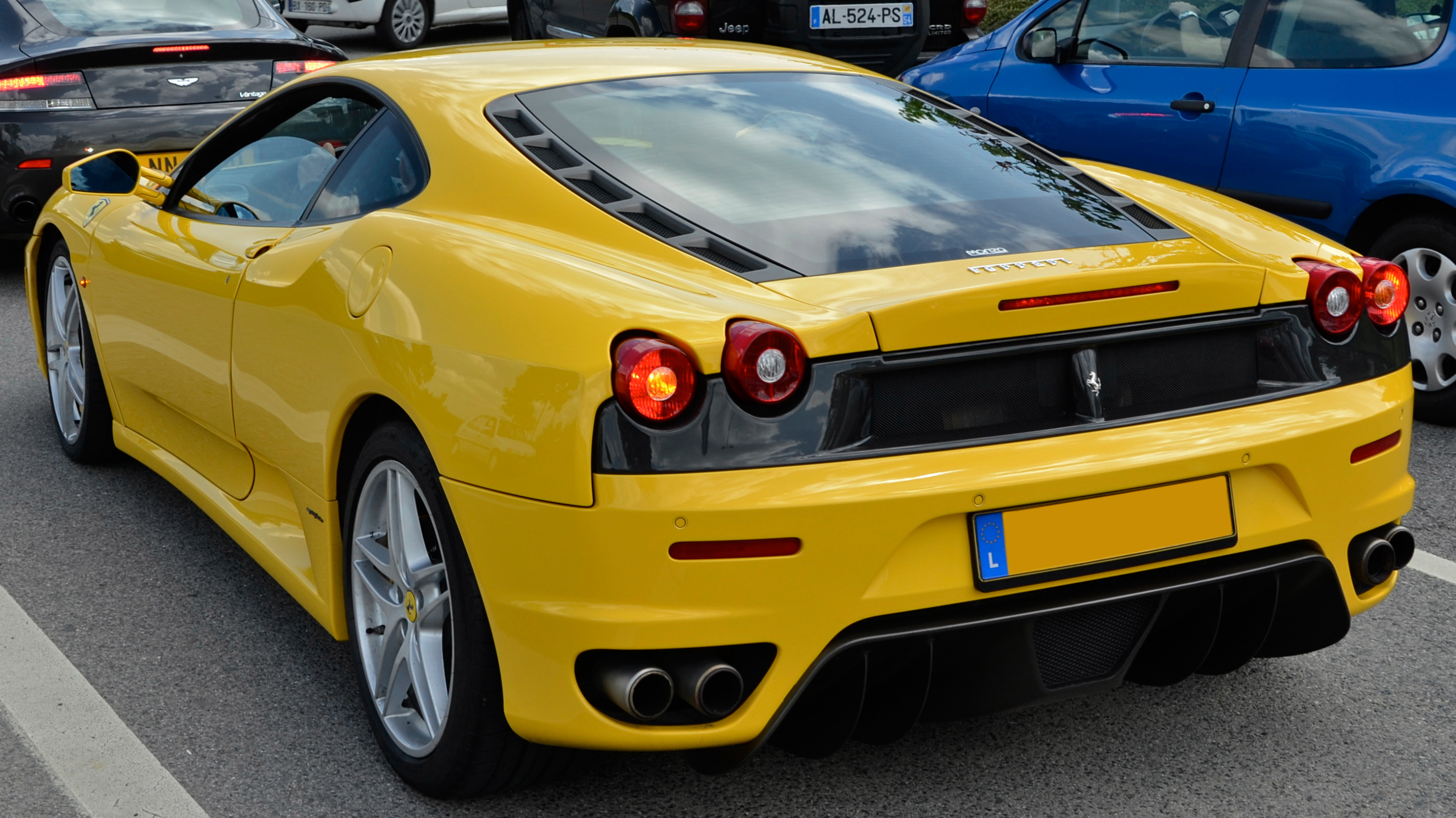 Ferrari F430